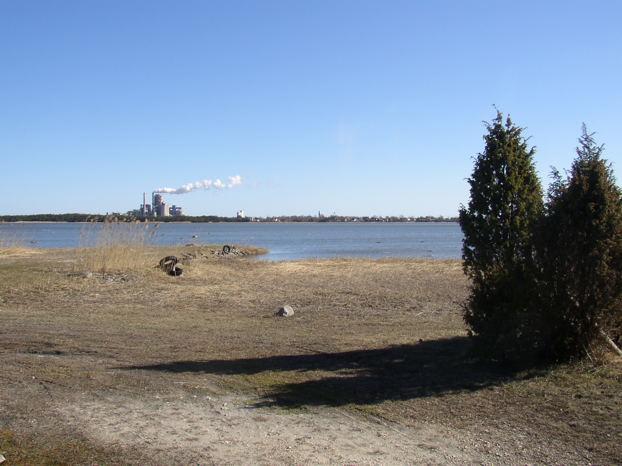 Bogeviken, met cementfabriek op de achtergrond Rindert 16:29, 6 April 2007 (UTC)